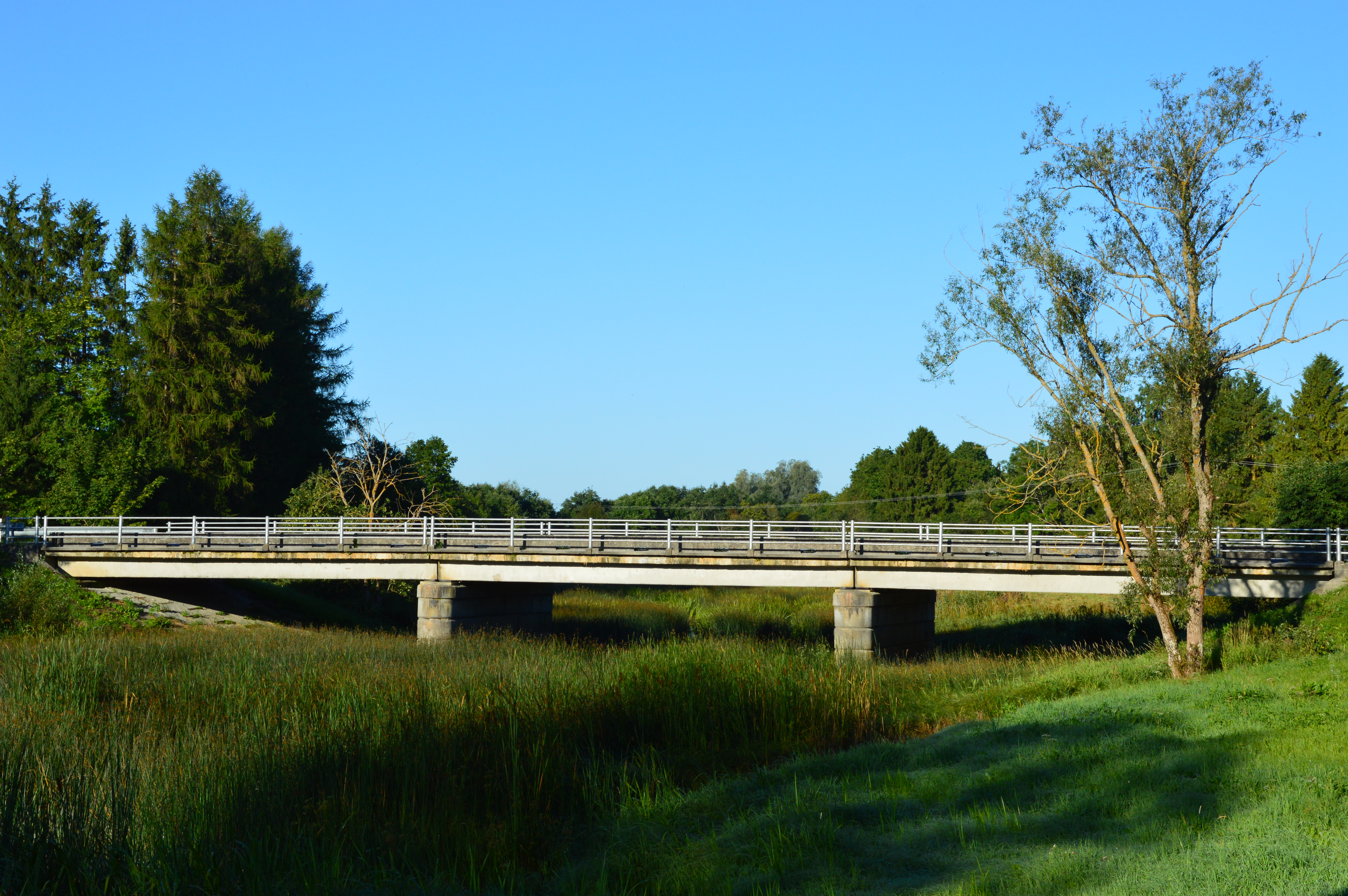 Vängla sild üle Velise jõe